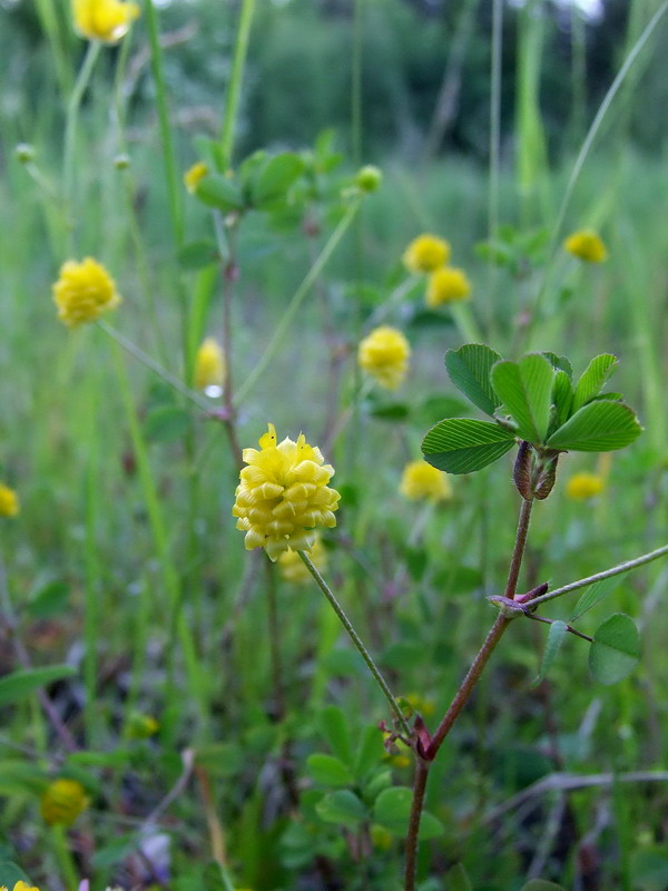 Trifolium campestre. Veseluvka, Jonava district, Lithuania.